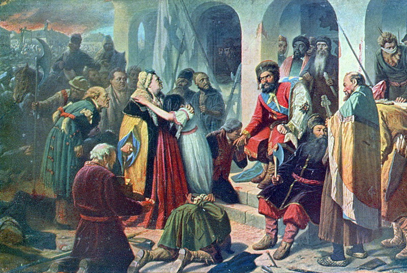 Суд Пугачева